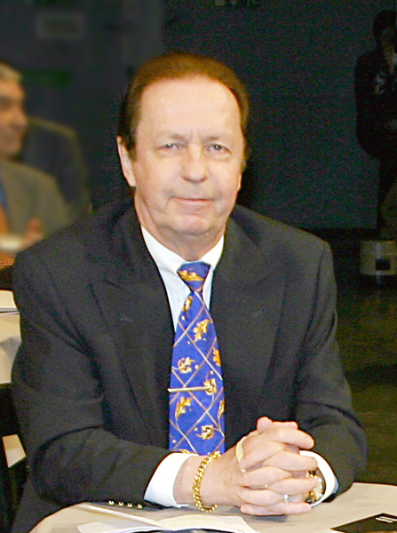 Gerhard Fuchs, deutscher Fernsehjournalist und Fernsehdirektor des Bayerischen Rundfunks (seit 1995)